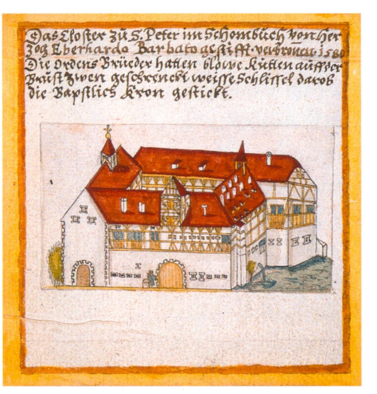 Petersstift auf dem Einsiedel Württembergische Landesbibliothek, Stuttgart S. 50